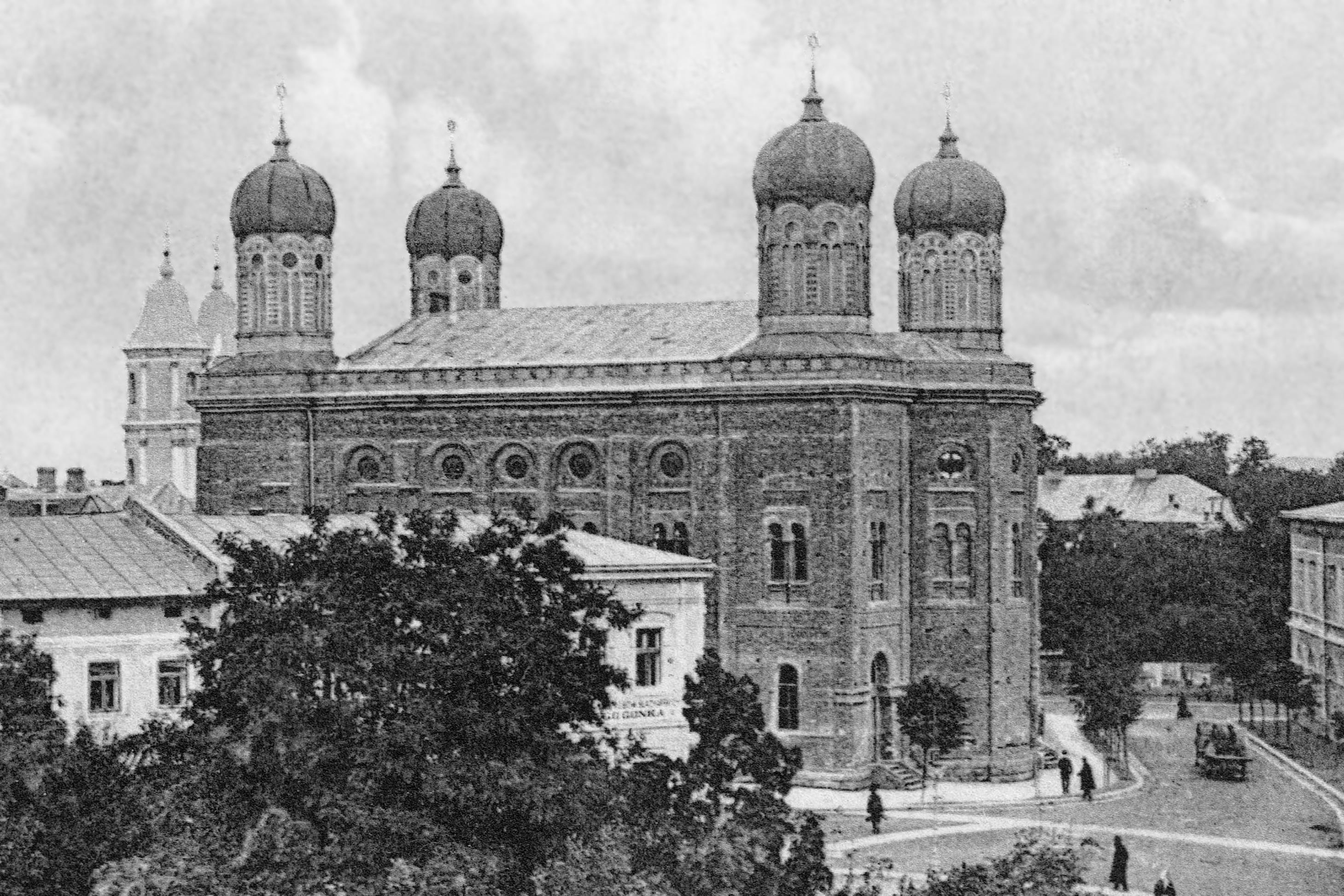 Tempel Synagogue in Stanisławów, Second Polish Republc, today Iwano Frankiwisk, Ukraine.